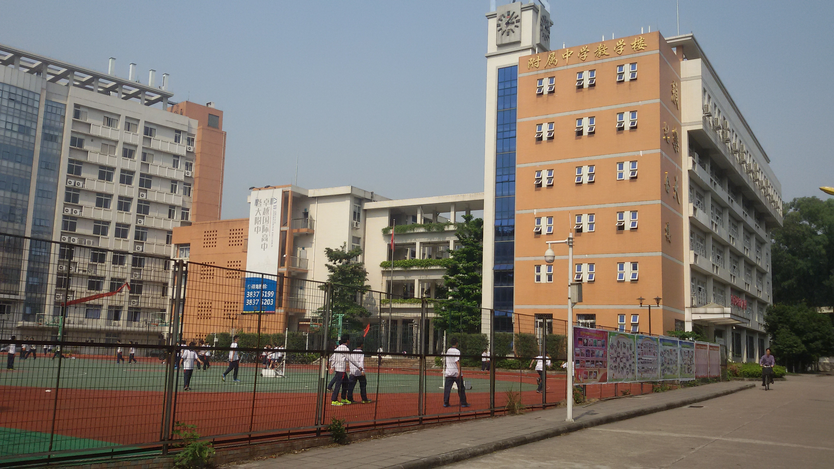 粵語: 暨南大學附屬中學嘅學校教學樓